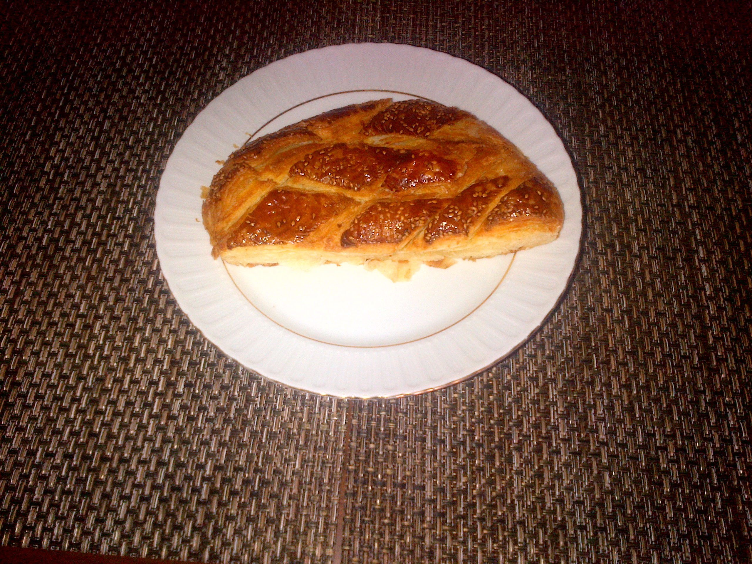 Medio "Katmer de Sivas" comprado en Ankara, Turquia. (No he podido esperar para la foto y comi la mitad. :)